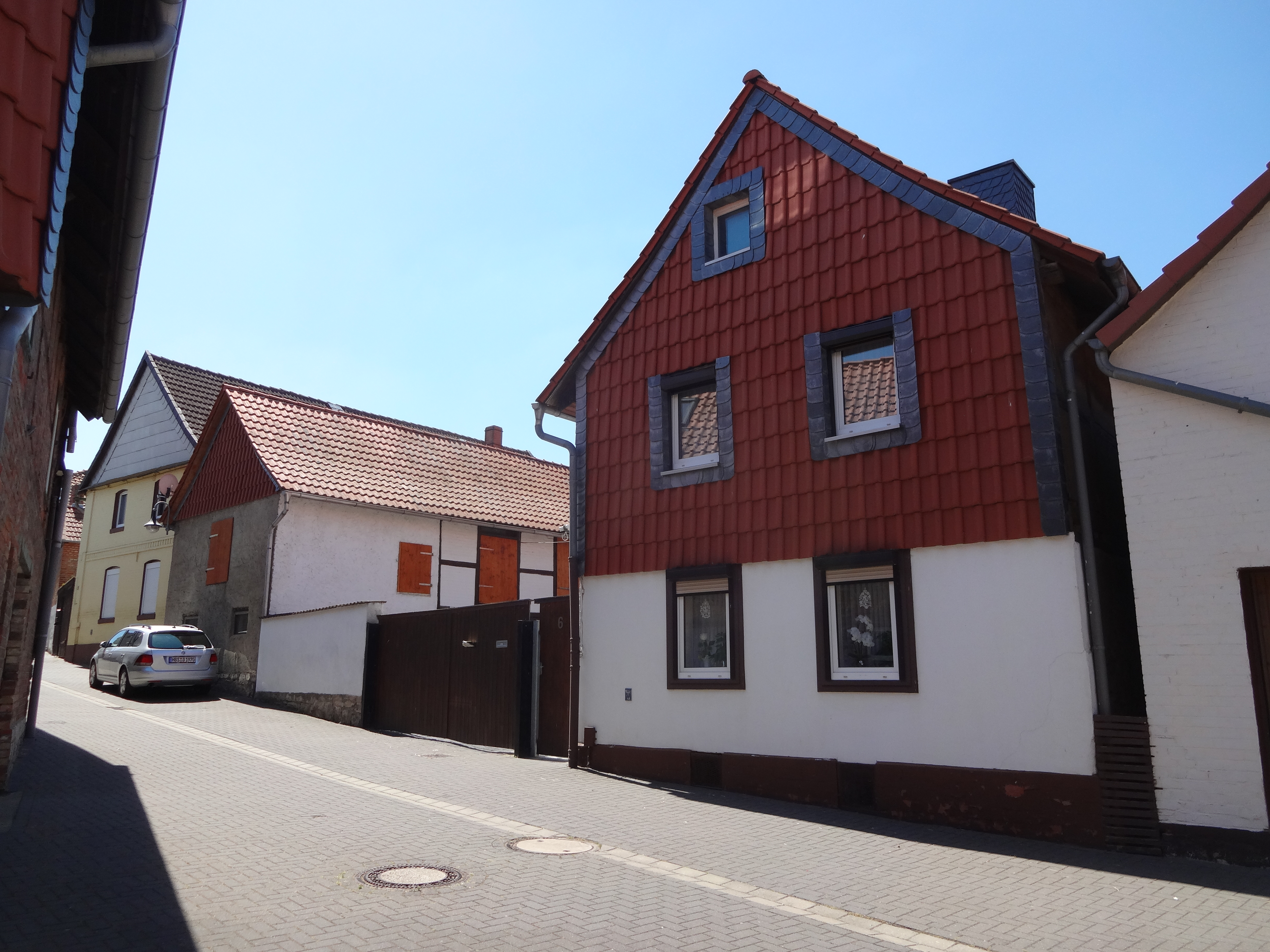 denkmalgeschützter Bauernhof in der Straße Graue 6 in Dedeleben